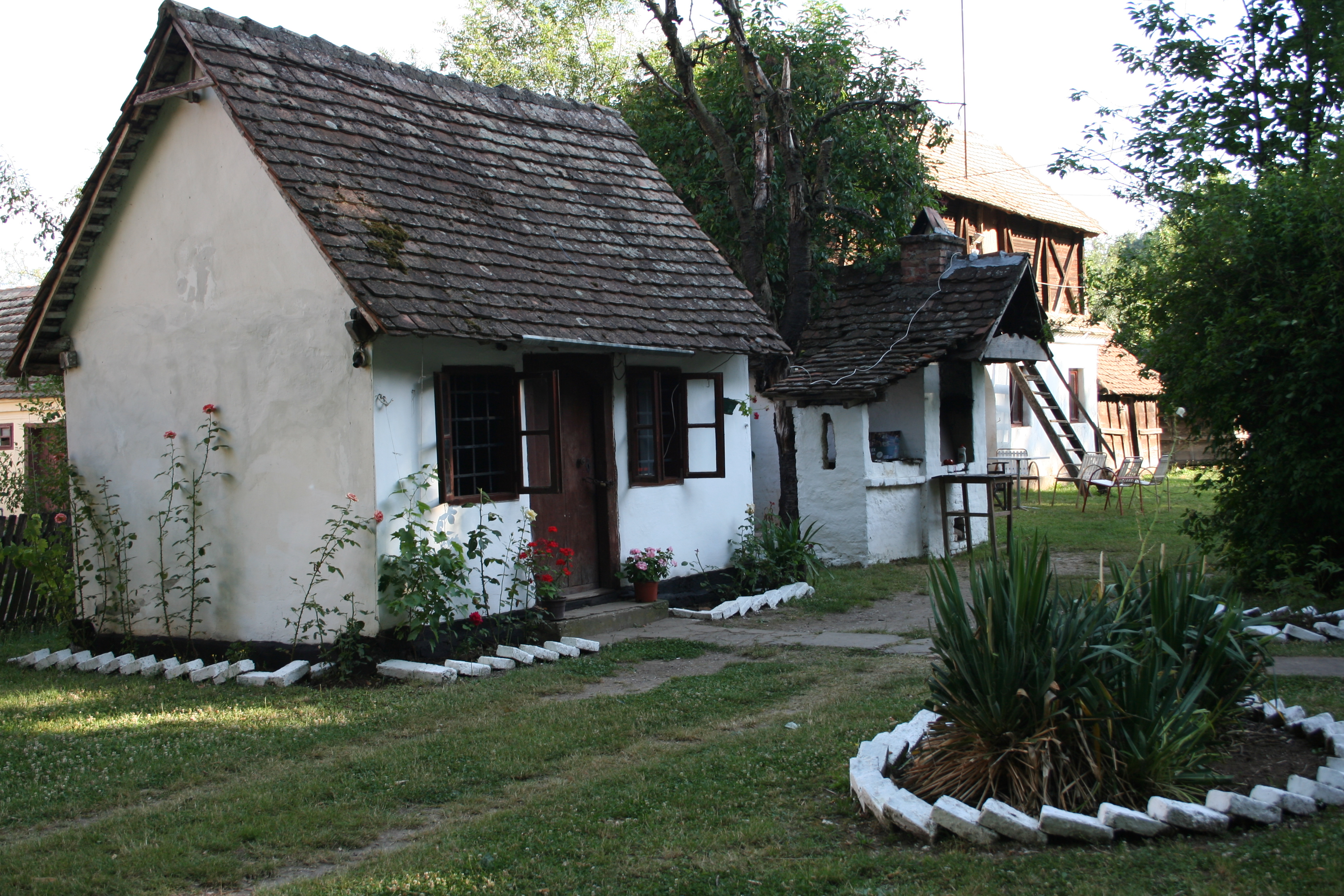 Etno park u Sovljaku